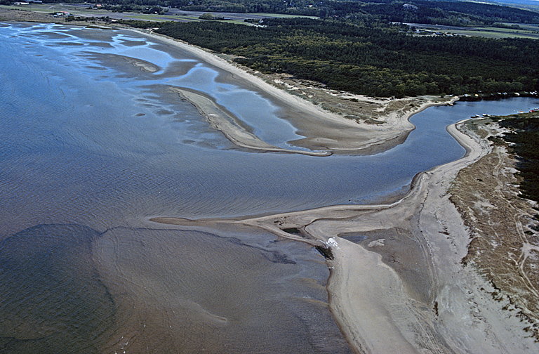 Suseåns mynning. Bilden troligen från mitten av 1970-talet. Motiv: Suseån Nyckelord: Flygbilder Kategori: Kust- och skärgårdsmiljö Suseåns mynning. Bilden troligen från mitten av 1970-talet.